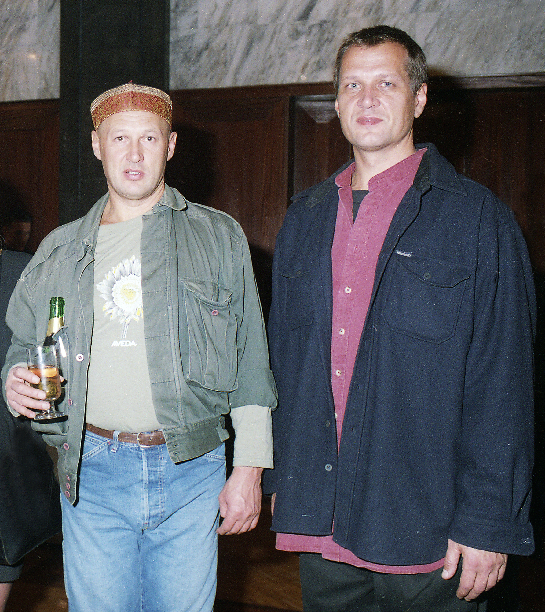 Tarmo Urb ja vend Toomas Urb 97